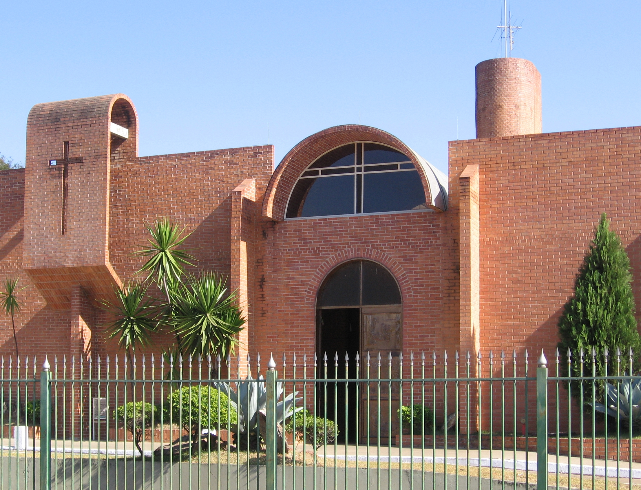 Paróquia São Camilo de Lellis - Catholic church in Brasilia, Brazil